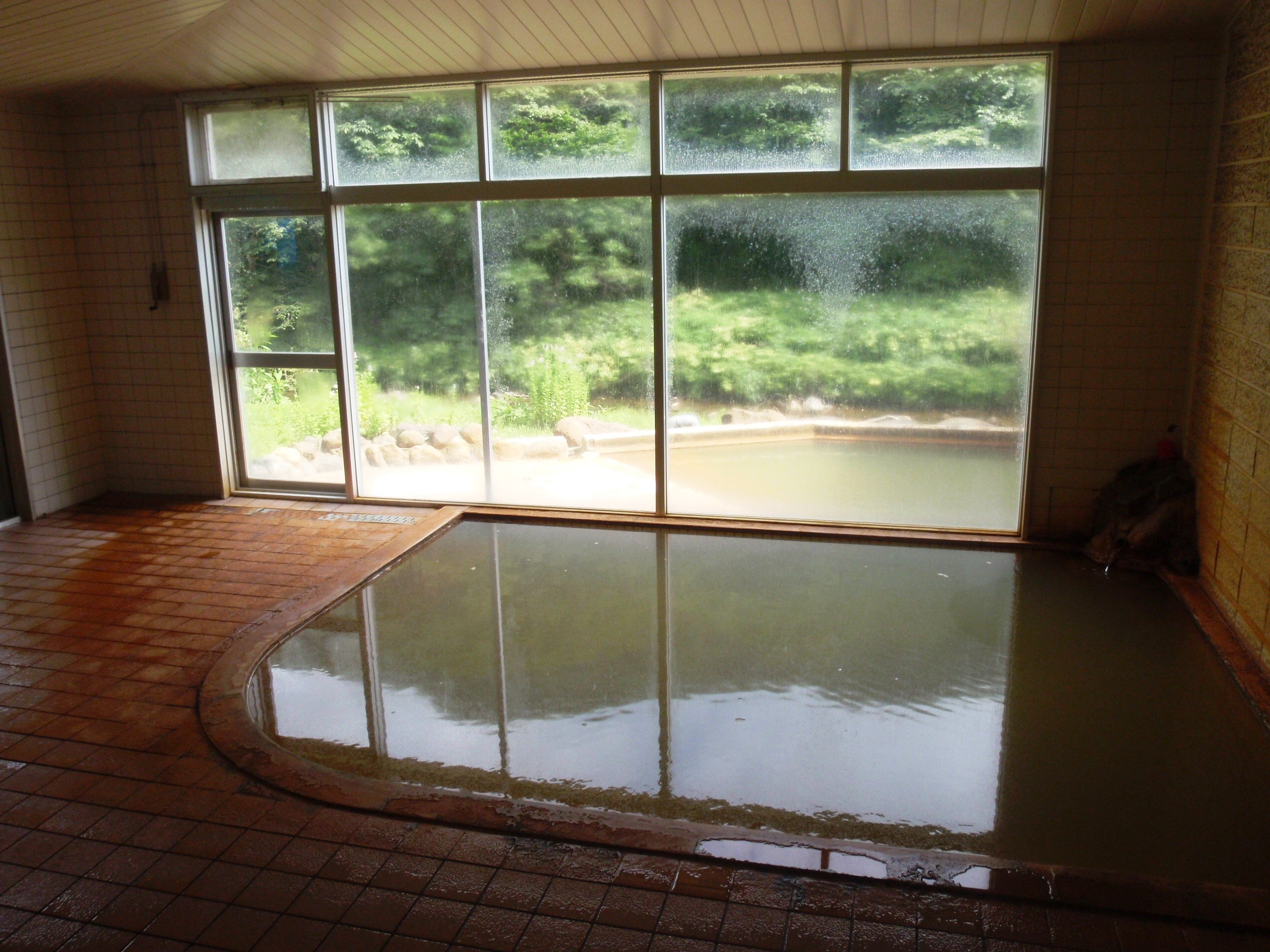 見市温泉浴室